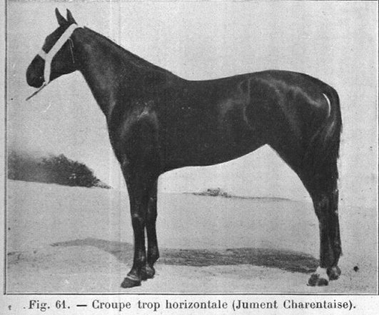 Jument charentaise dans le Guide pratique pour la connaissance et l'élevage du cheval, 1911